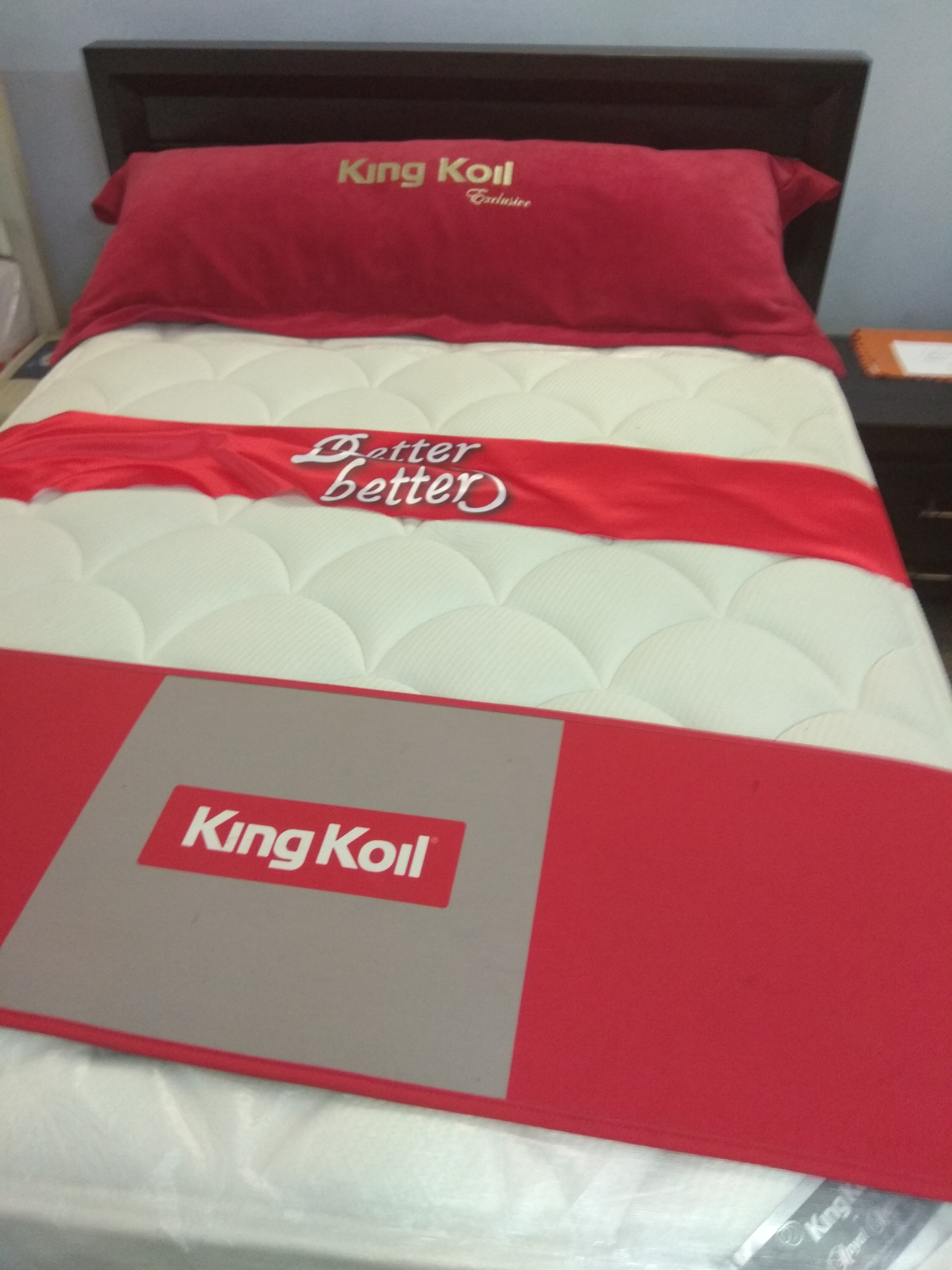 מבית עמינח King Koil מזרן